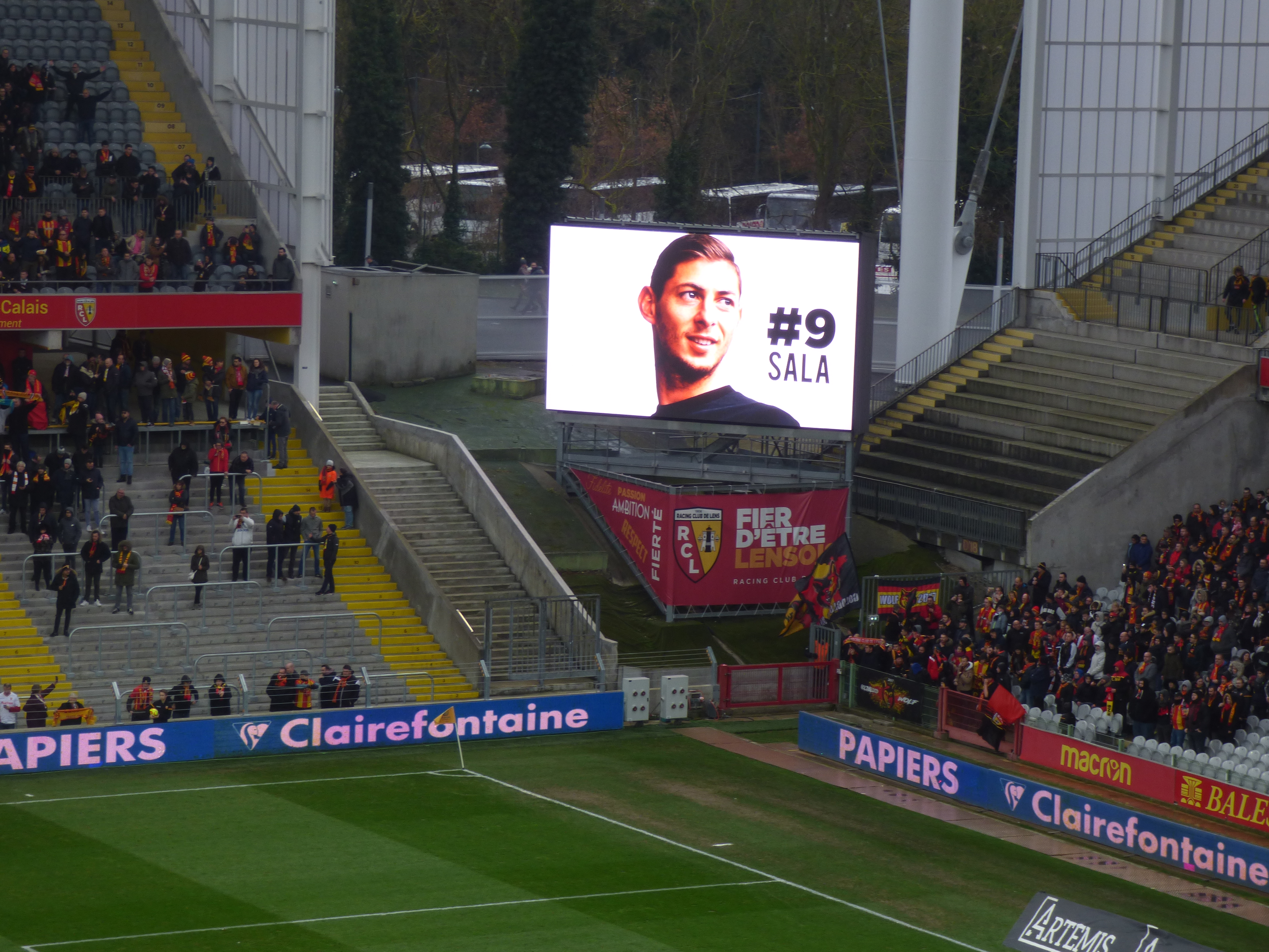 Hommage à Emiliano Sala avant le match RC Lens / FC Metz, comptant pour la vingt-quatrième journée du championnat de France de Ligue 2 2018-2019, le 9 février 2019, au Stade Bollaert-Delelis.